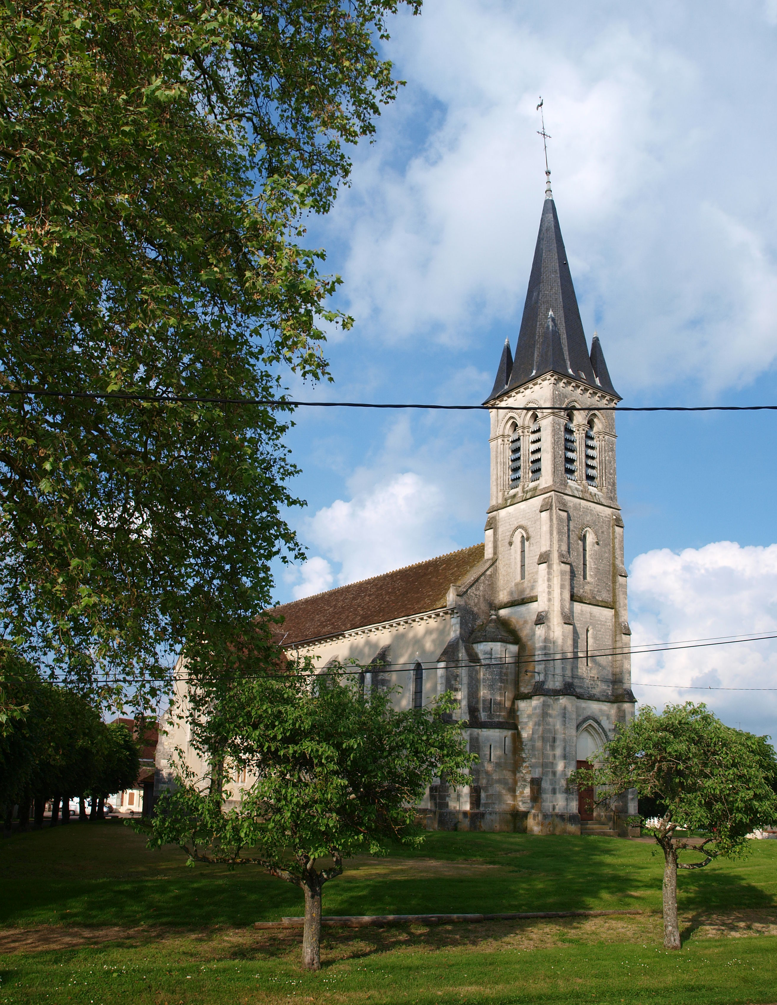 Égleny (Yonne, France)